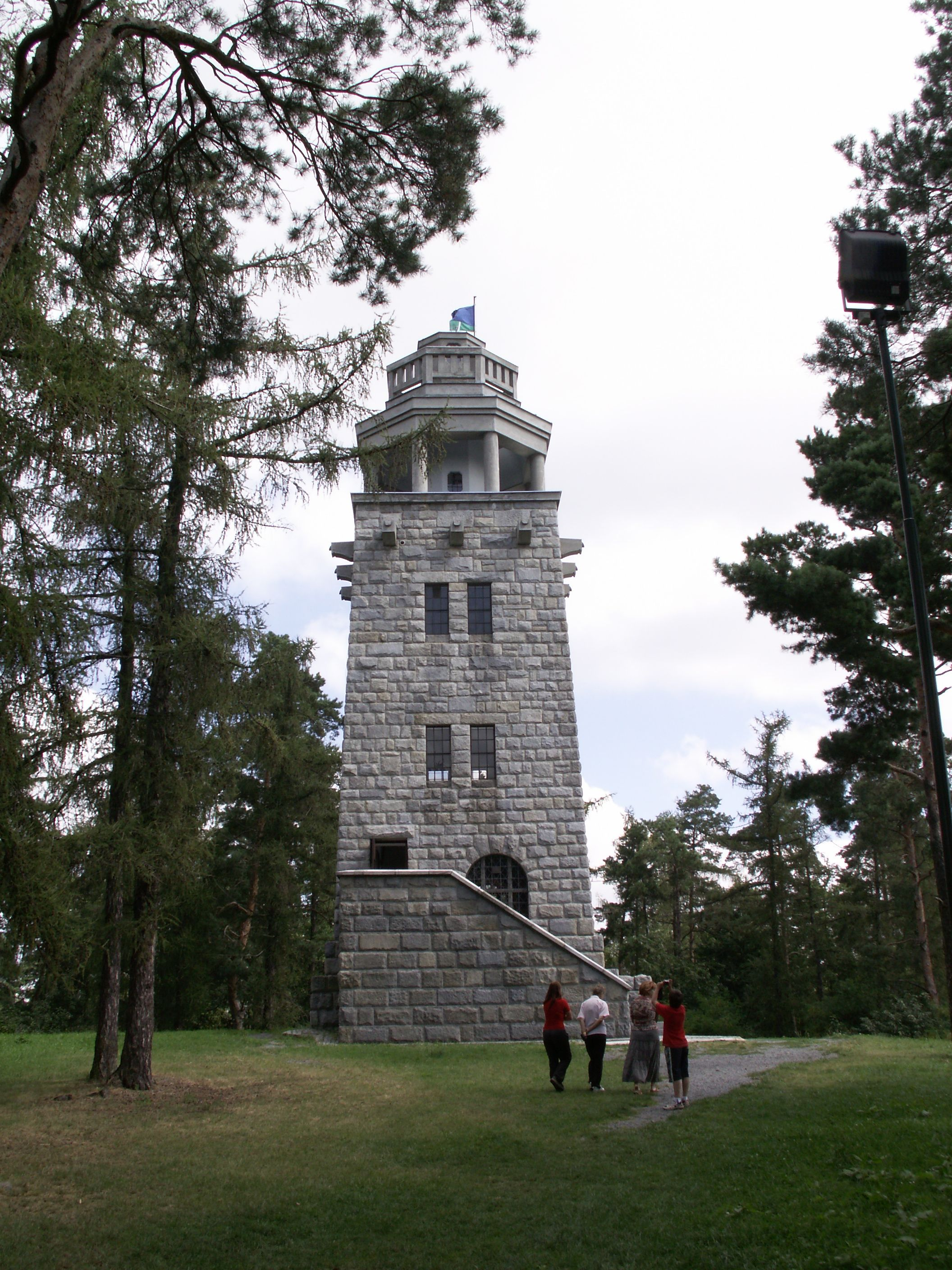 Rozhledna Hanse Kudlicha na vrchu Strážiště u Úvalna, okres Bruntál